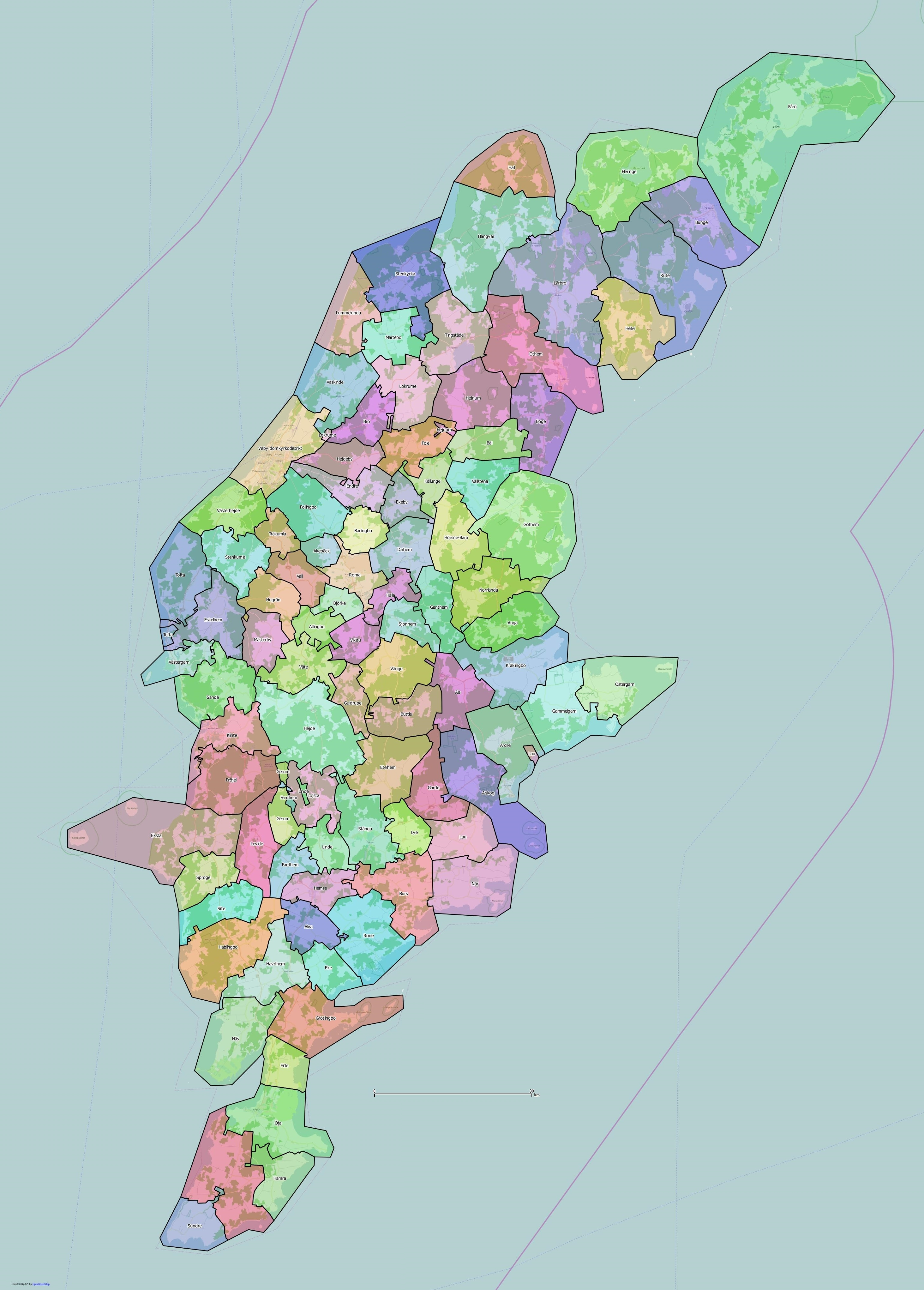 Distriktsindelningen i Gotlands kommun